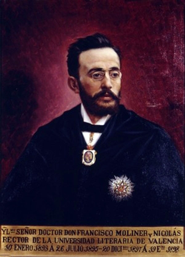 Retrato del médico, catedrático y político español Francisco Moliner Nicolás (1851-1915).